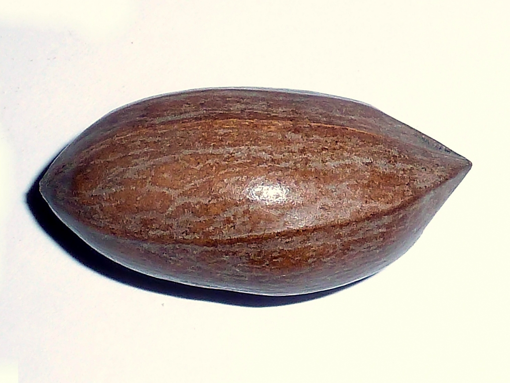 Carya illinoinensis (Nuez de Pecán) - Nuez entera (trima sin epicarpio/mesocarpio envolvente) - Comercio, procedencia desconocida, Madrid (España).